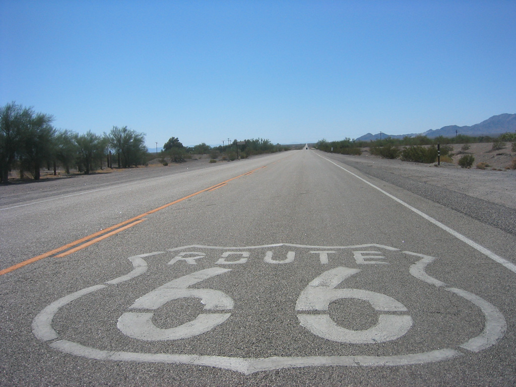 Route 66 im August 2004